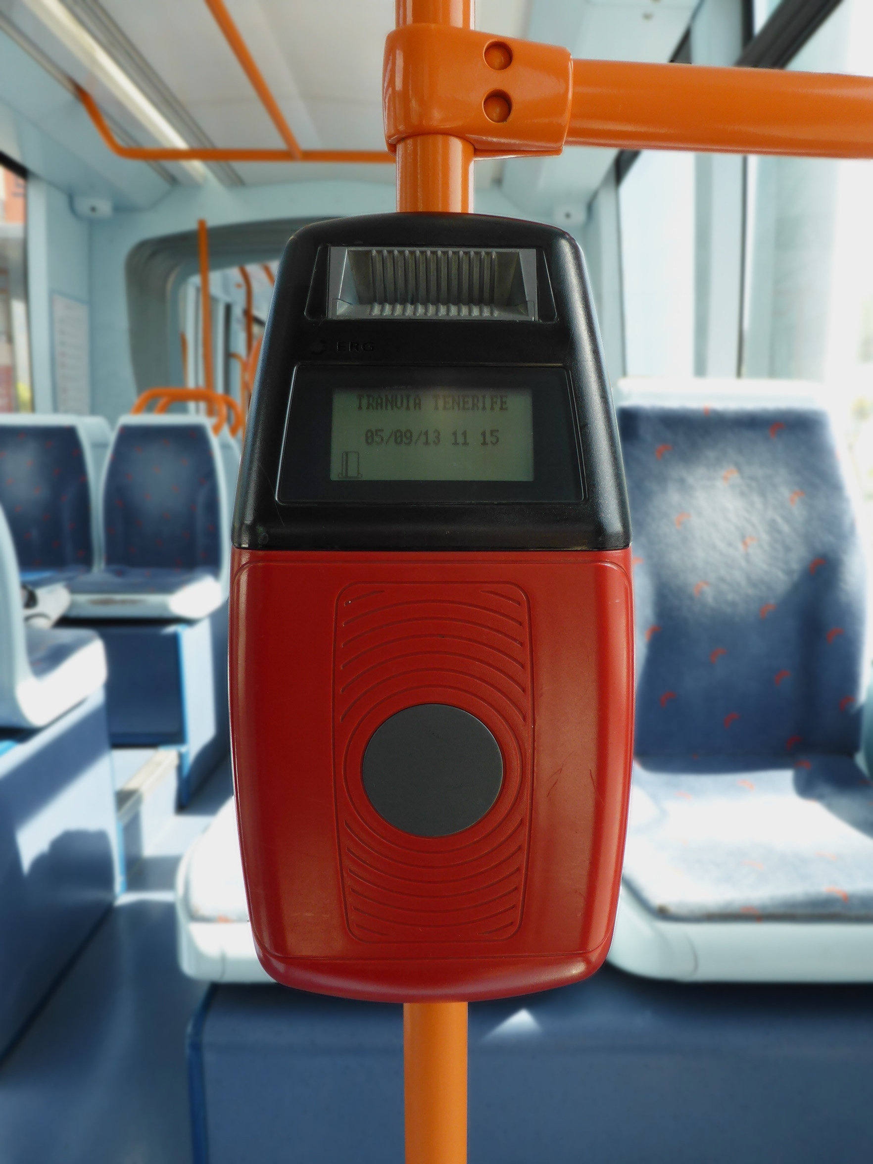 Entwerter der Straßenbahn von Teneriffa (2011).